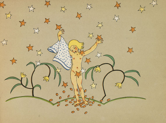 Tom Seidmann-Freud. Illustration aus "Kleine Märchen". Verlag von A. und M. Hausser, Ludwigsburg, 1921